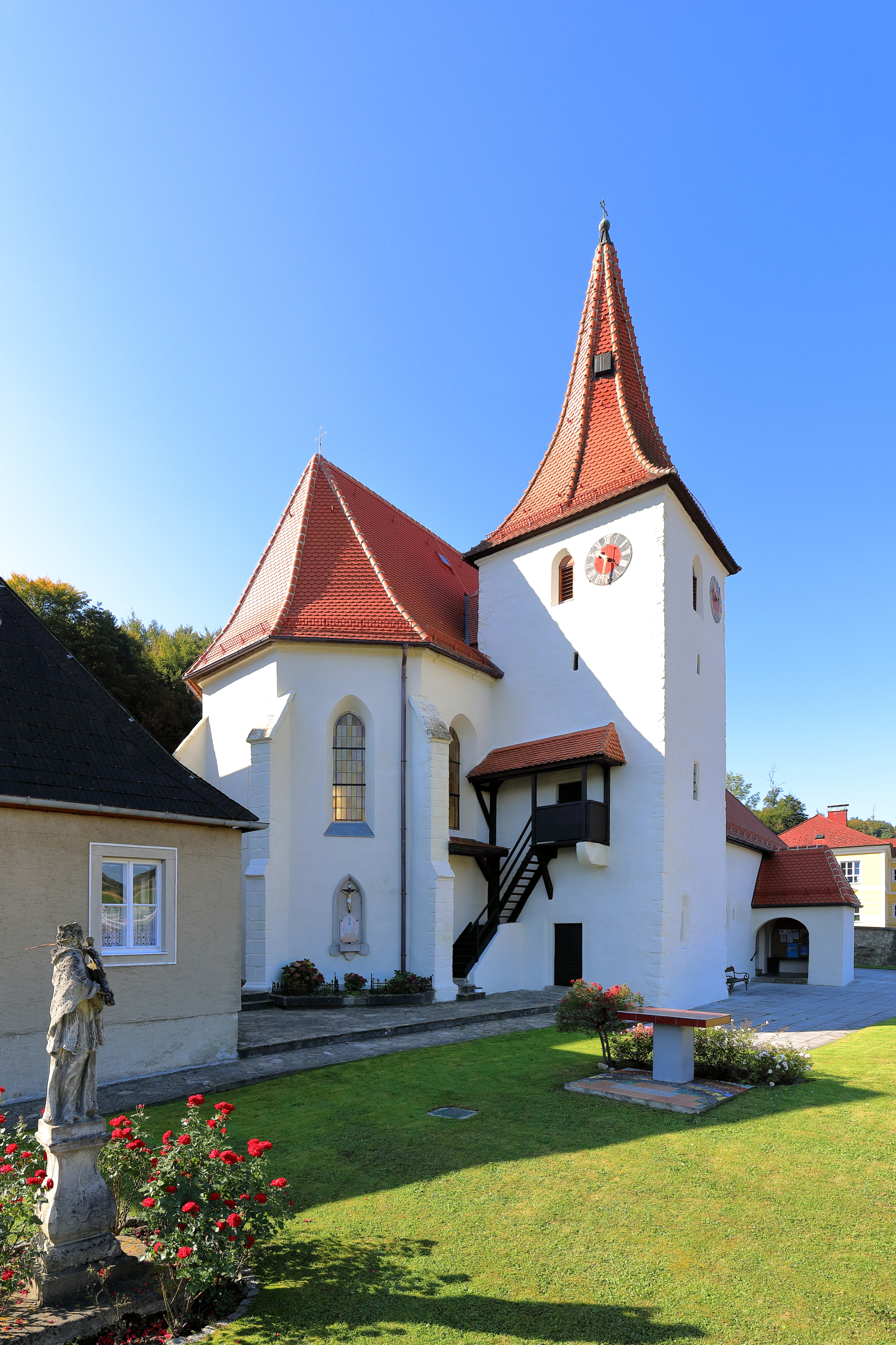 Der Kirchturm mit dem Chor der röm.-kath. Pfarrkirche hll. Simon und Judas Thaddäus in der niederösterreichischen Marktgemeinde Altlengbach. Im Vordergrund der ehemalige Friedhof und ein Bildstock des hl. Nepomuk aus der Mitte des 18. Jahrhunderts.